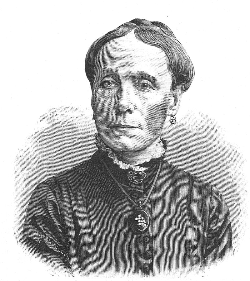 Hanna Lindberg (1865-1951)